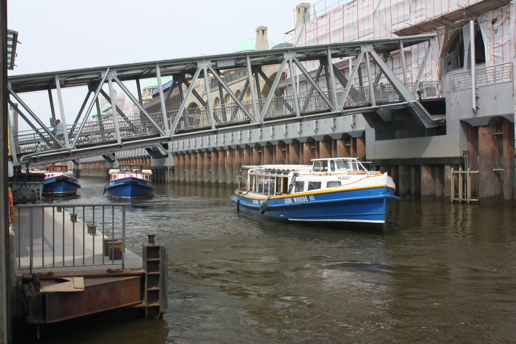 Eine Barkasse an den Landungsbrücken